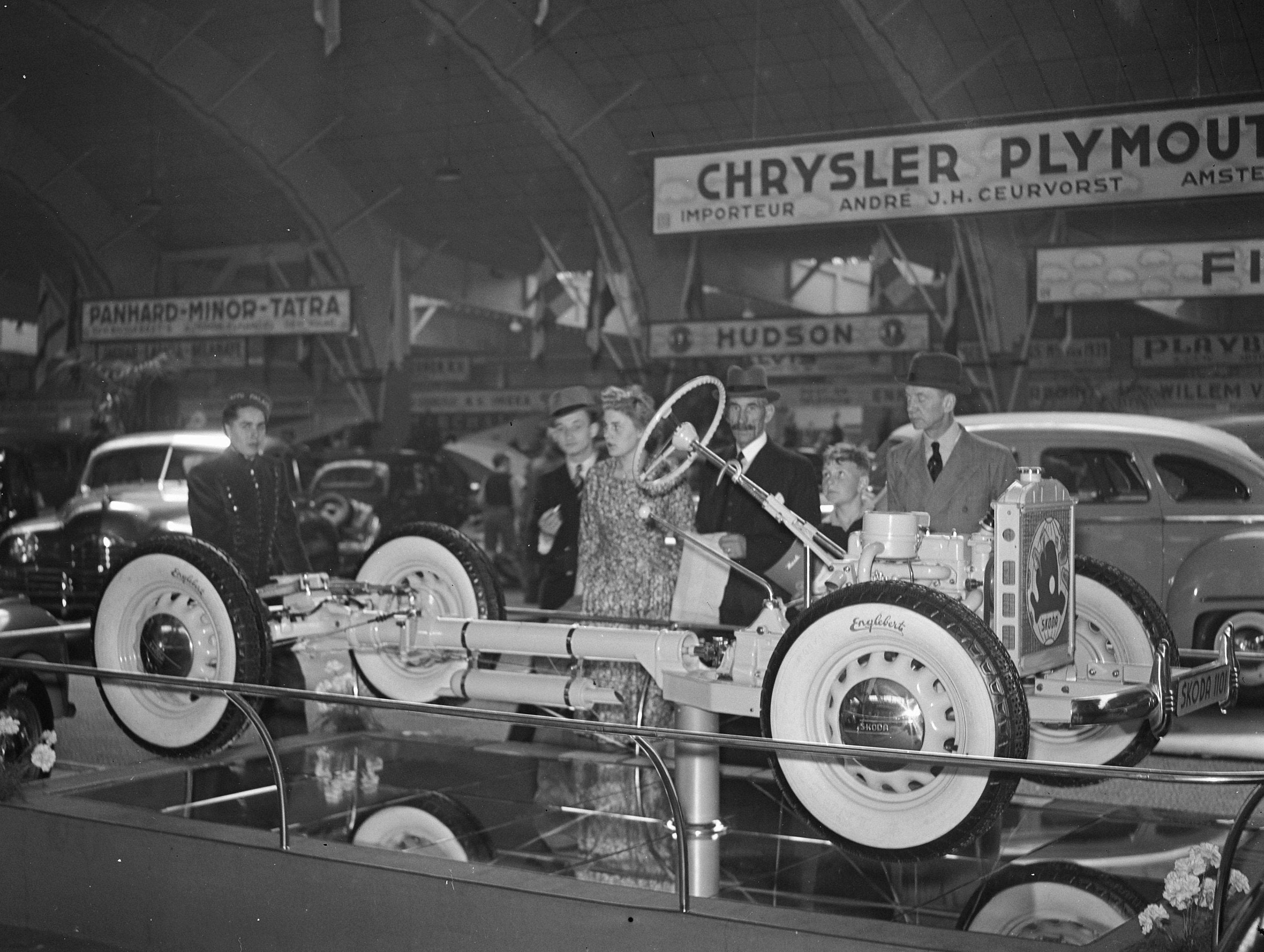 Collectie / Archief : Fotocollectie Anefo Reportage / Serie : [ onbekend ] Beschrijving : Opnamen RAI Skoda-chassis Datum : 6 mei 1948 Locatie : Amsterdam, Noord-Holland Instellingsnaam : RAI Fotograaf : Oorschot, […] van / Anefo Auteursrechthebbende : Nationaal Archief Materiaalsoort : Glasnegatief Nummer archiefinventaris : bekijk toegang 2.24.01.09 Bestanddeelnummer : 902-7320